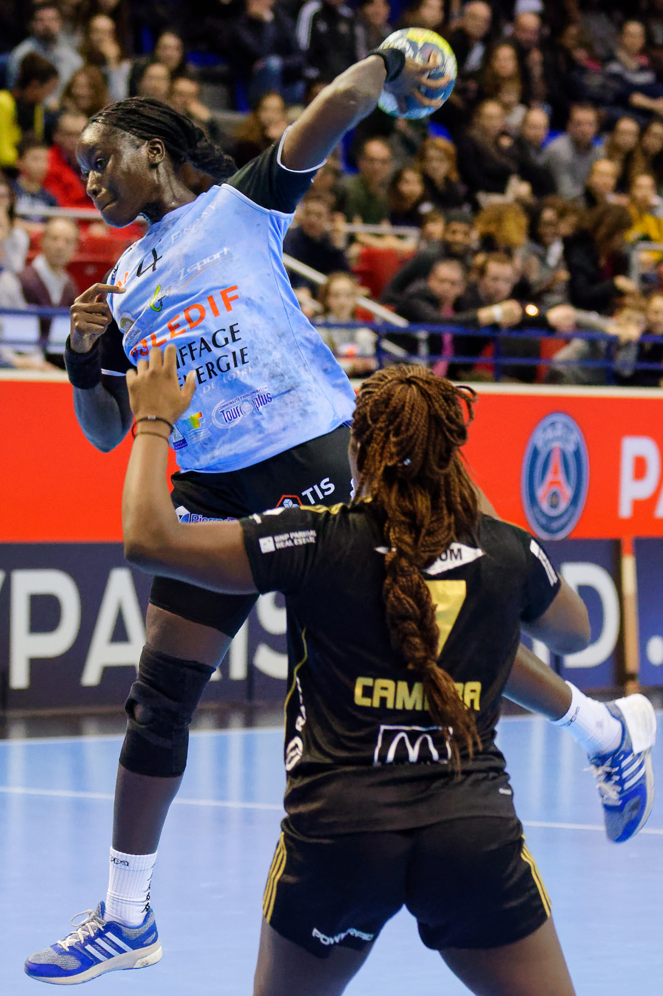 Rencontre Issy Paris Hand / Chambray. A Coubertin, le 26 février 2017.